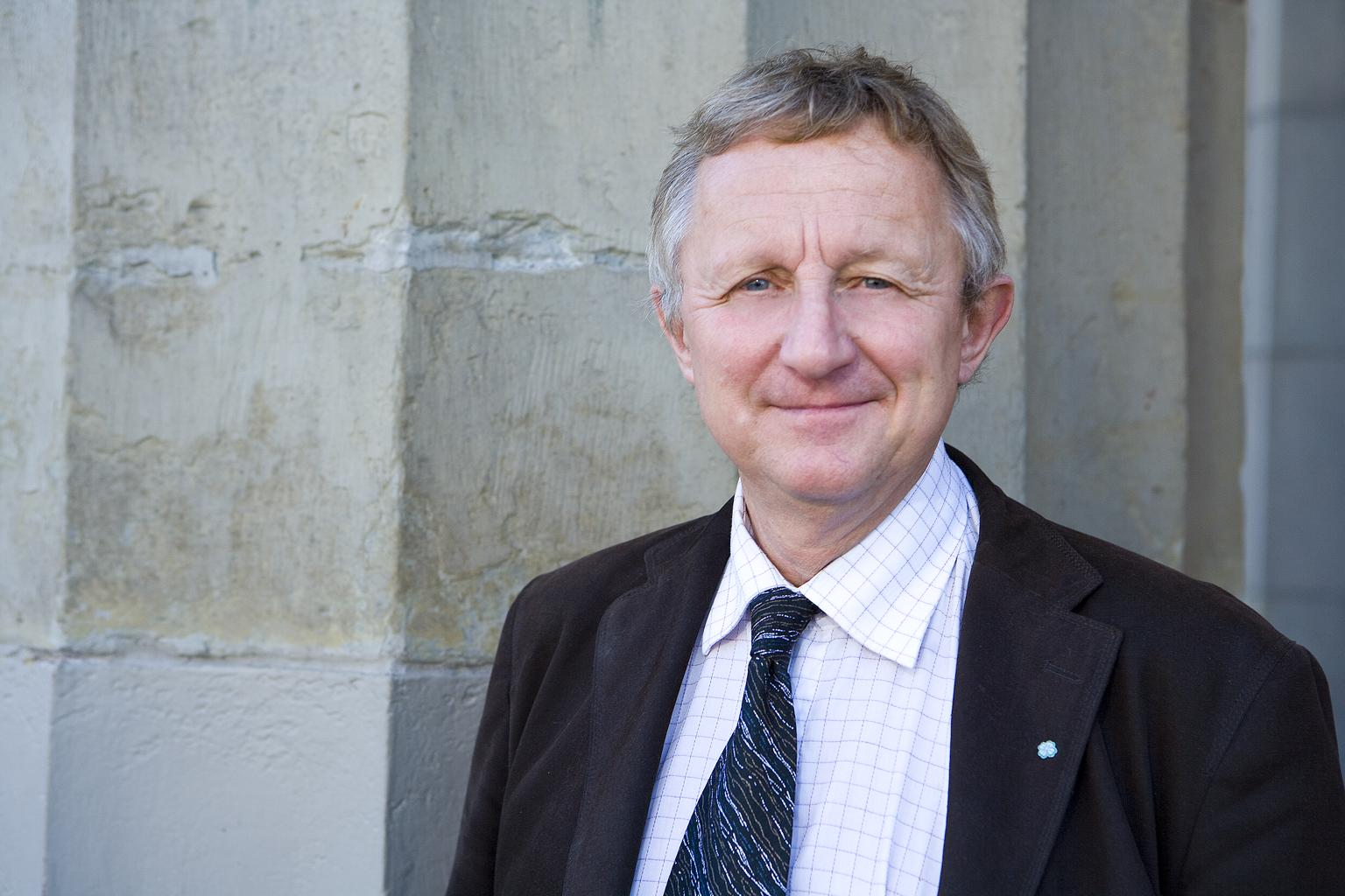 danielsson_staffan_02